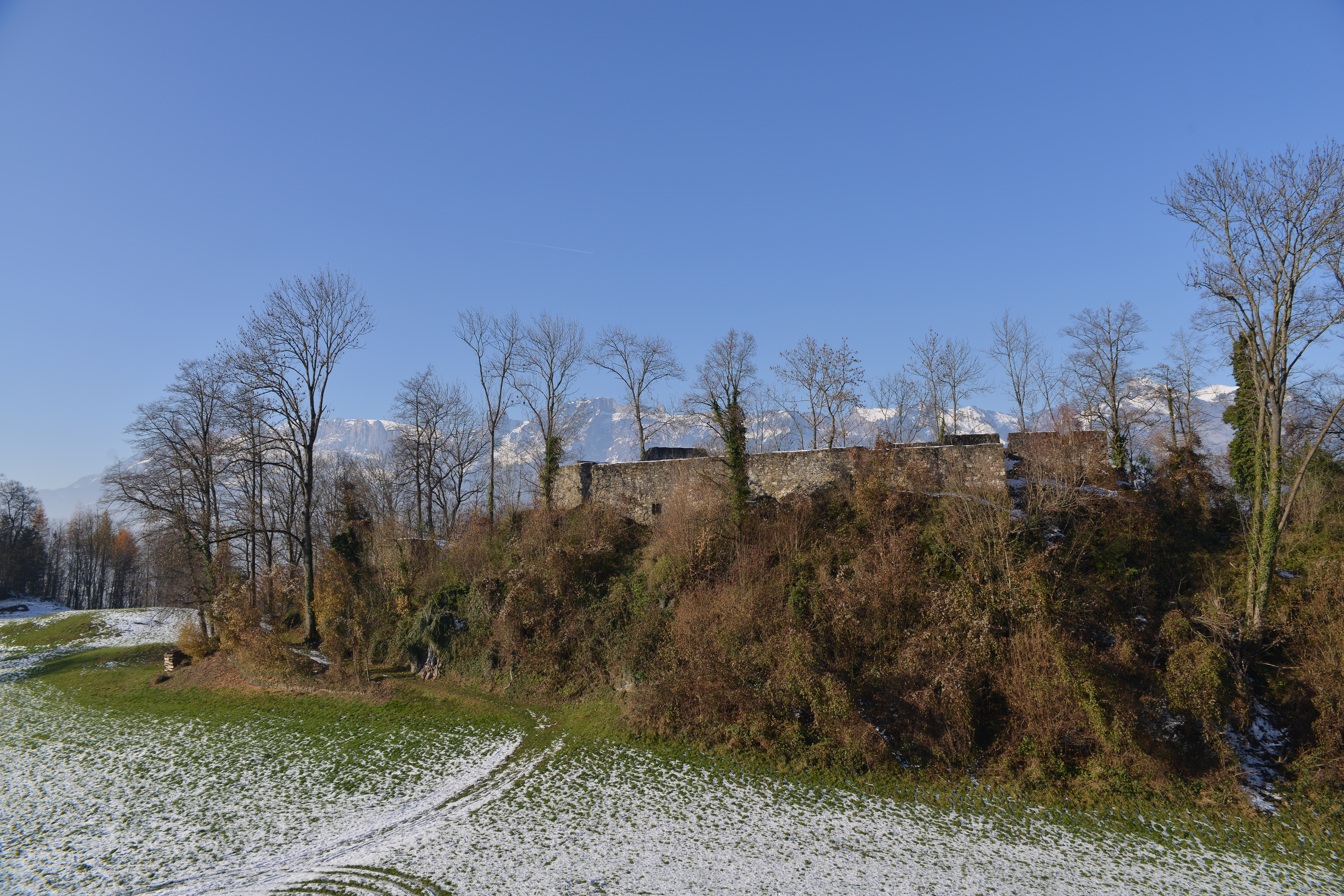 Untere Burg Schellenberg in Schellenberg FL.